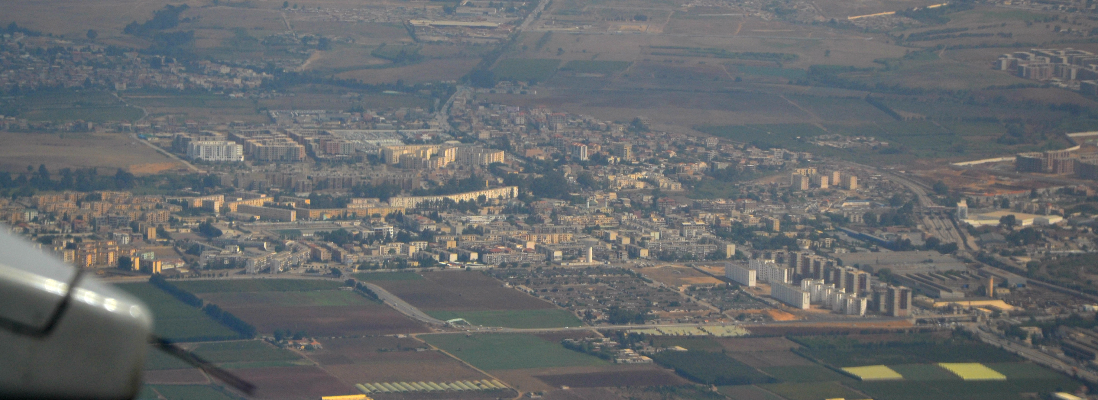 Vue aérienne de Reghaia le 1 Octobre 2014